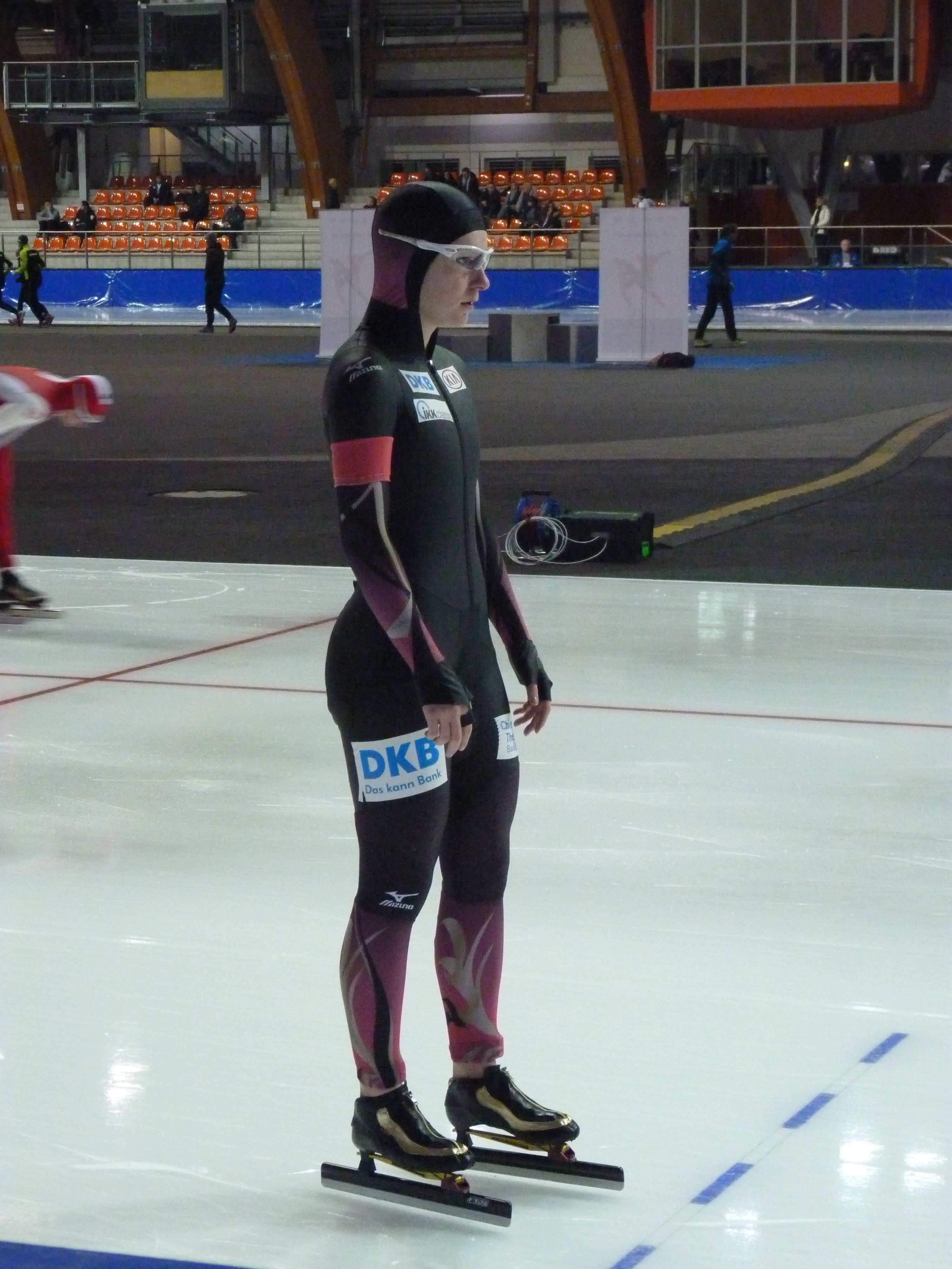 Michelle Uhrig beim Eisschnelllauf-Weltcup-Finale Junioren/Neo-Senioren in der Gunda-Niemann-Stirnemann-Halle, Erfurt, 12. Februar 2017.